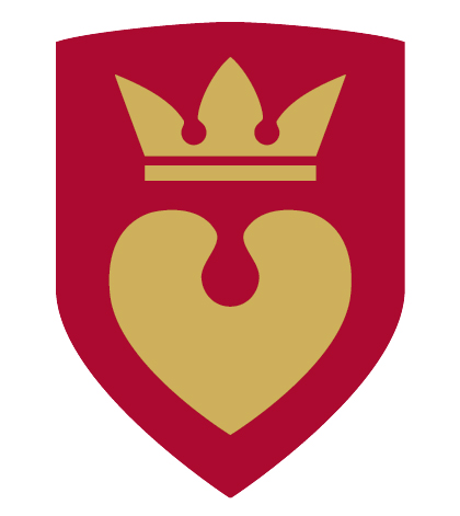 Shield of Hillerød Municipality (2007)